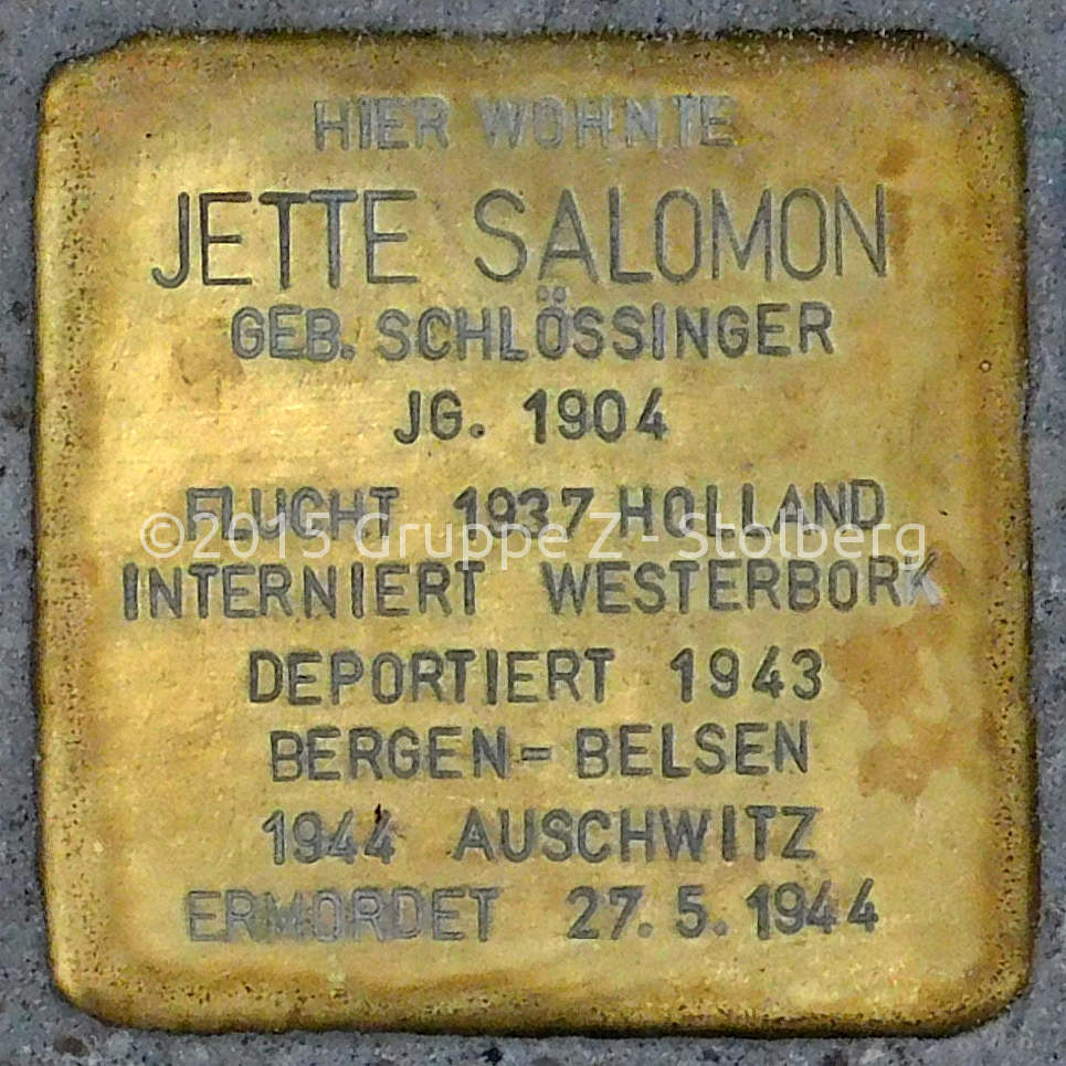 Stolperstein für Jette Salomon verlegt am 18. Dezember 2015